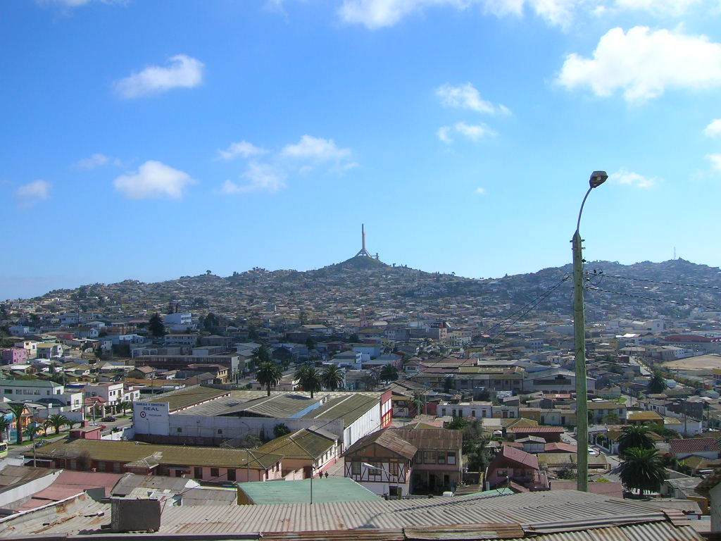 Coquimbo, Chile.